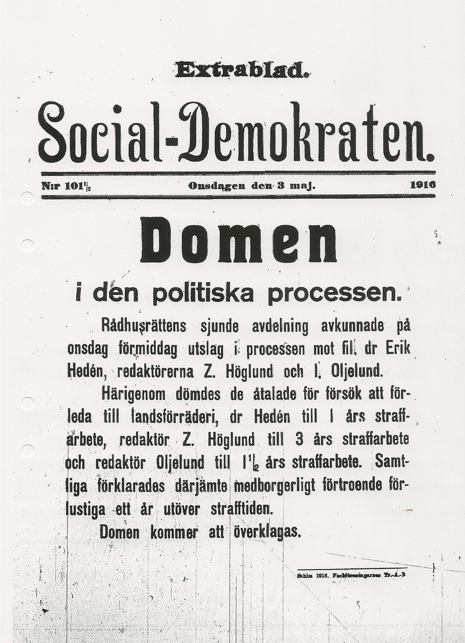 Domen i den så kallade förräderiprocessen avkunnades den 3 maj 1916.